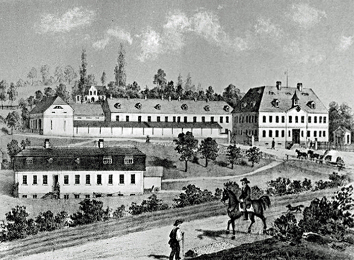 Röslerův zámeček, Mikulášovice čp. 442, stav kolem roku 1850